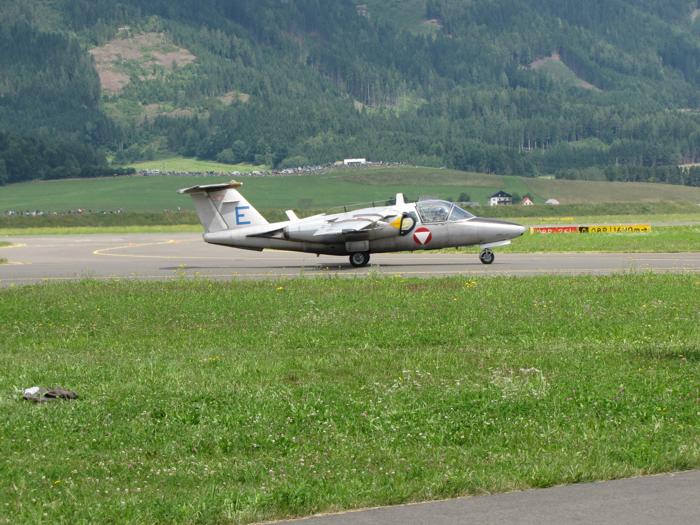 Az Osztrák Légierő Saab 105 Oe-je a zeltwegi Airpower 2013-n.